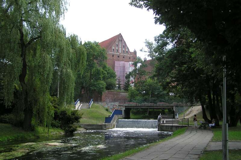 Olsztyn - Park przyzamkowy - wodospad